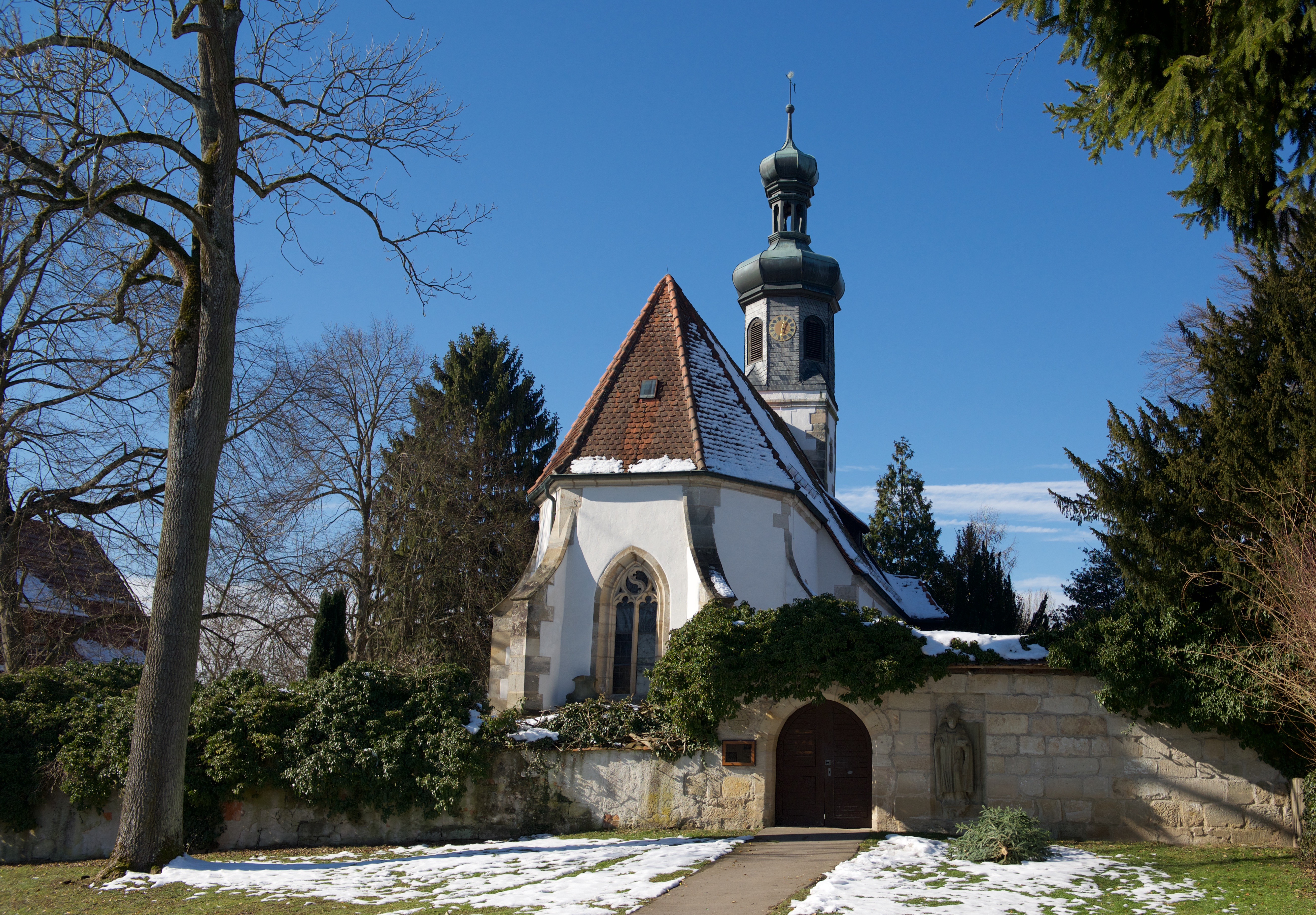 Ulrichskapelle Kloster Adelberg